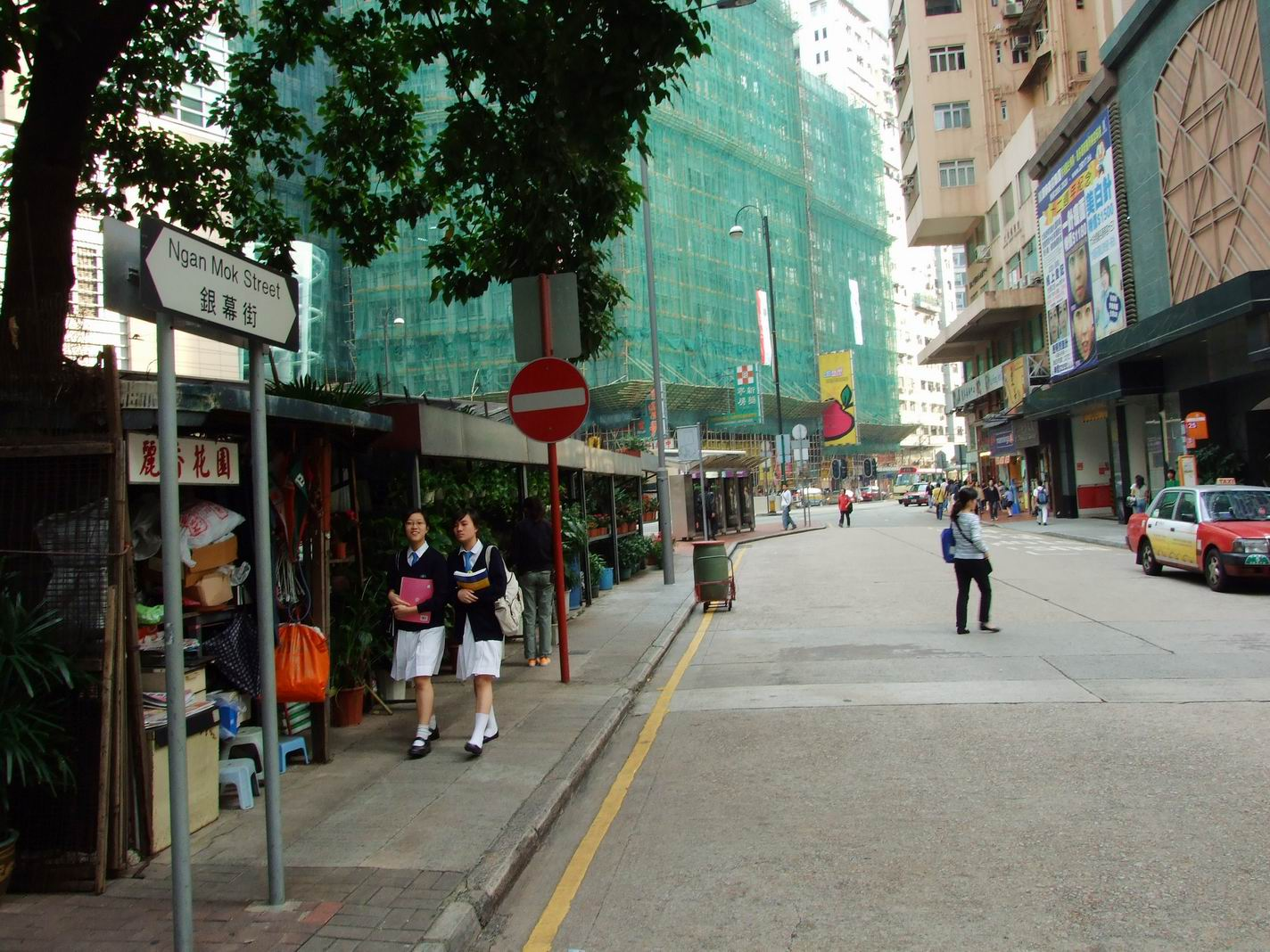 銀幕街